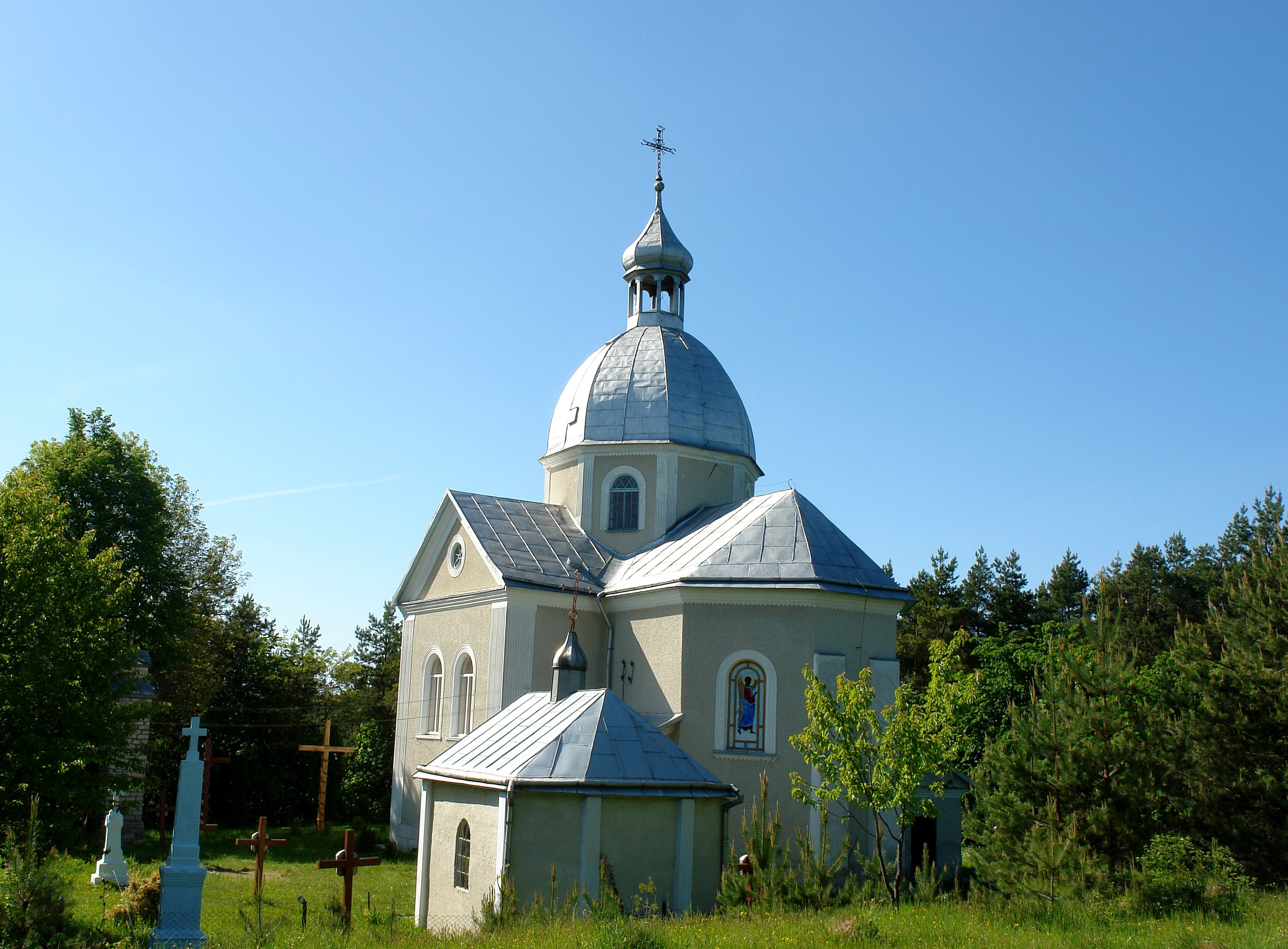 Храм Благовiщення Пречистої Дiви Марії с.Тучне Перемишлянського району